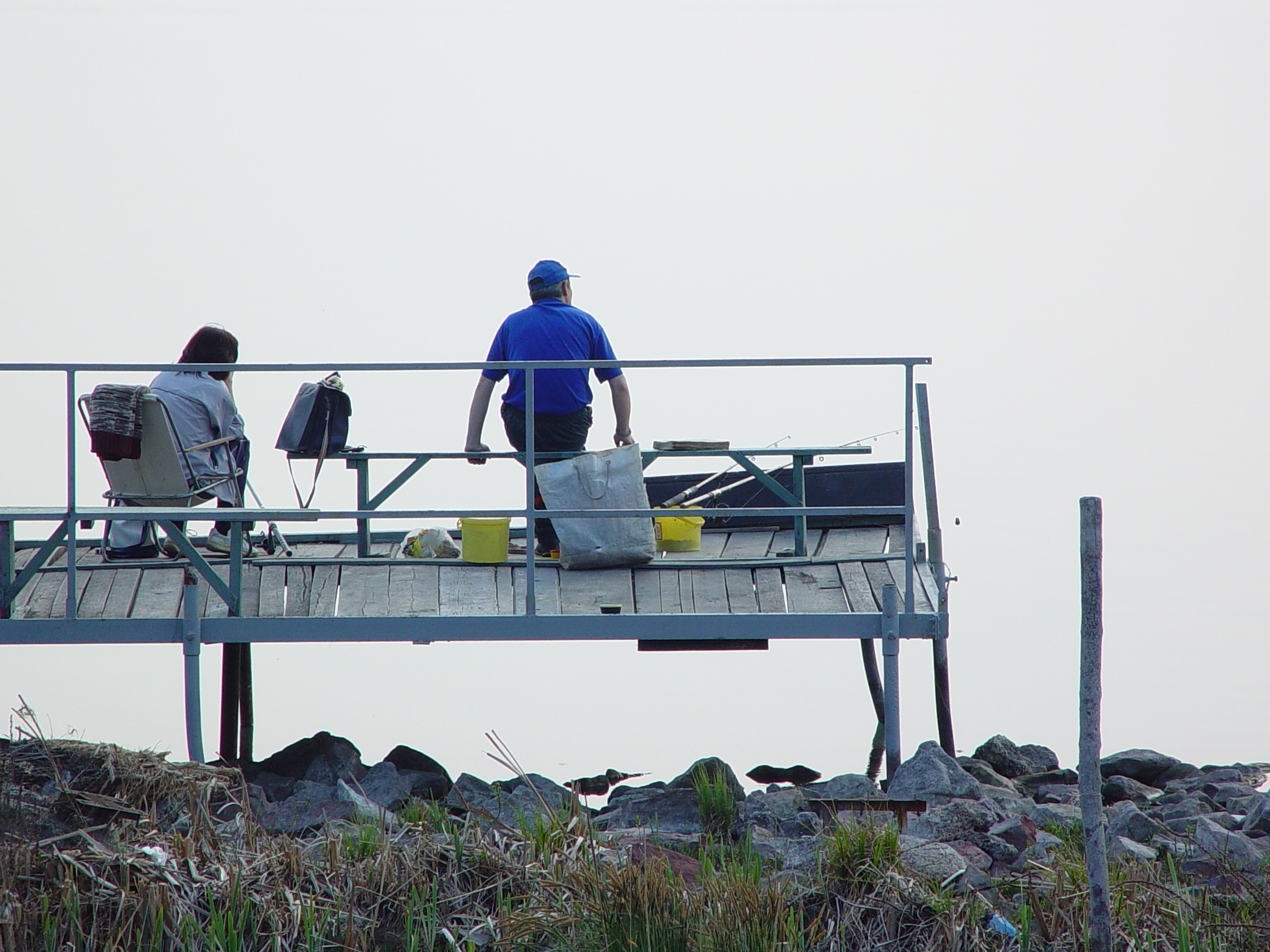 Balatoni horgászok